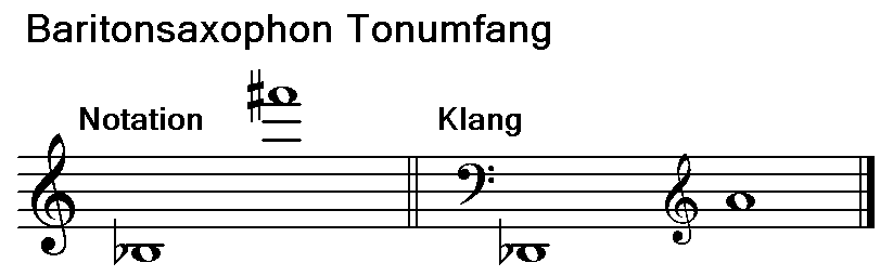 Notierter und klingender Tonumfang BaritonSax